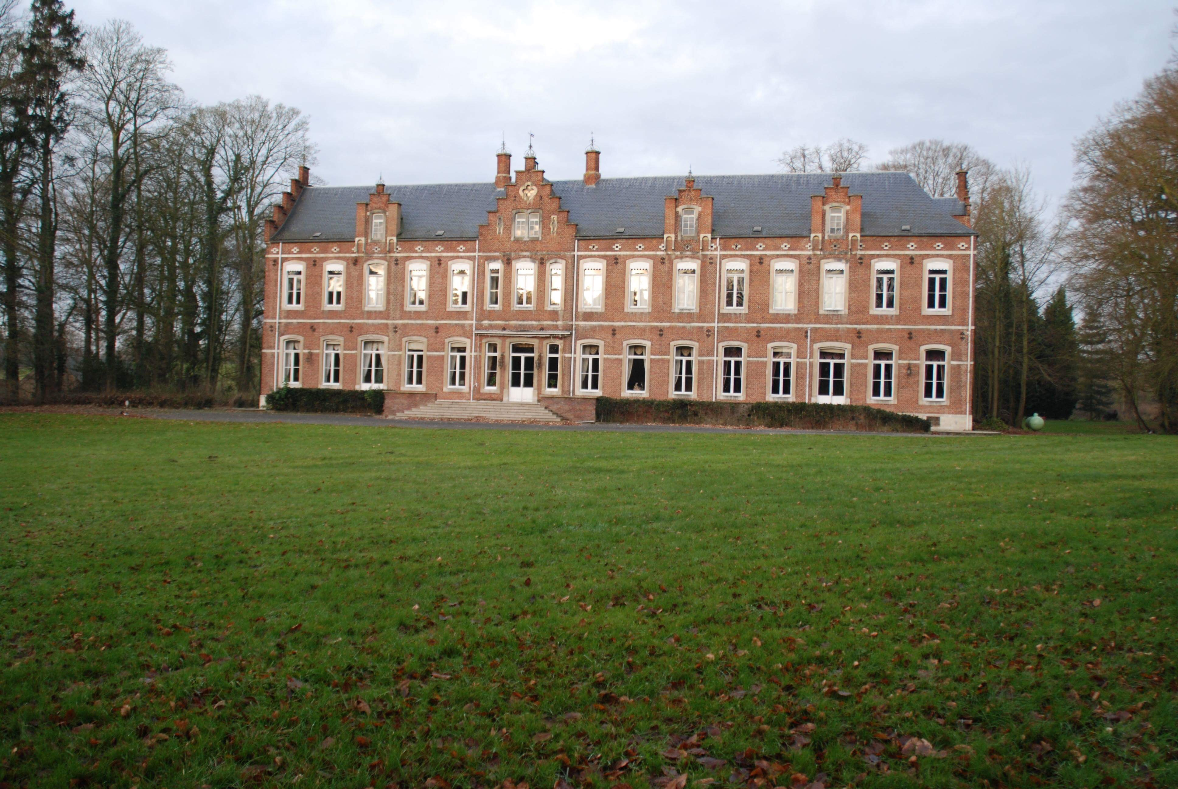 Le Chateau de Valduc à Hamme-Mille (19e siècle)